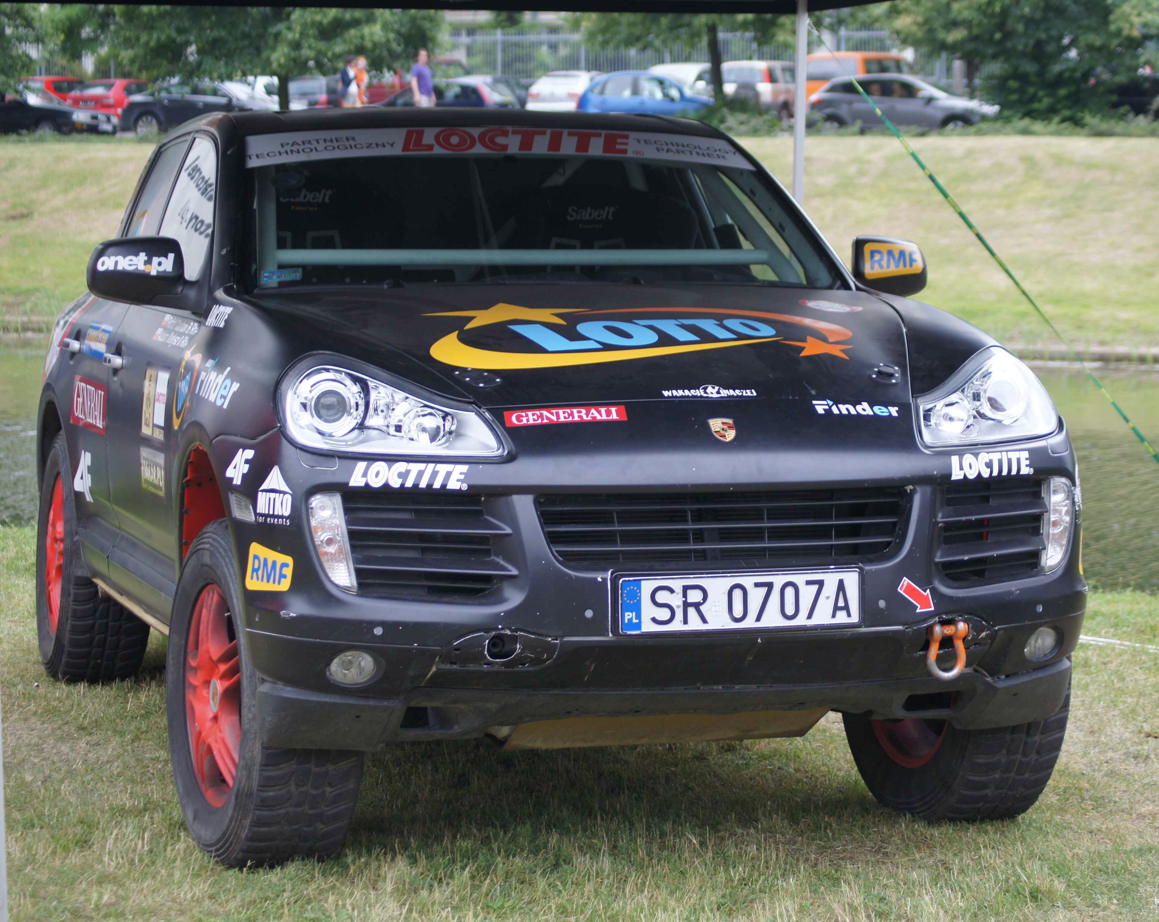 Samochód Adama Małysza, Porsche Cayenne